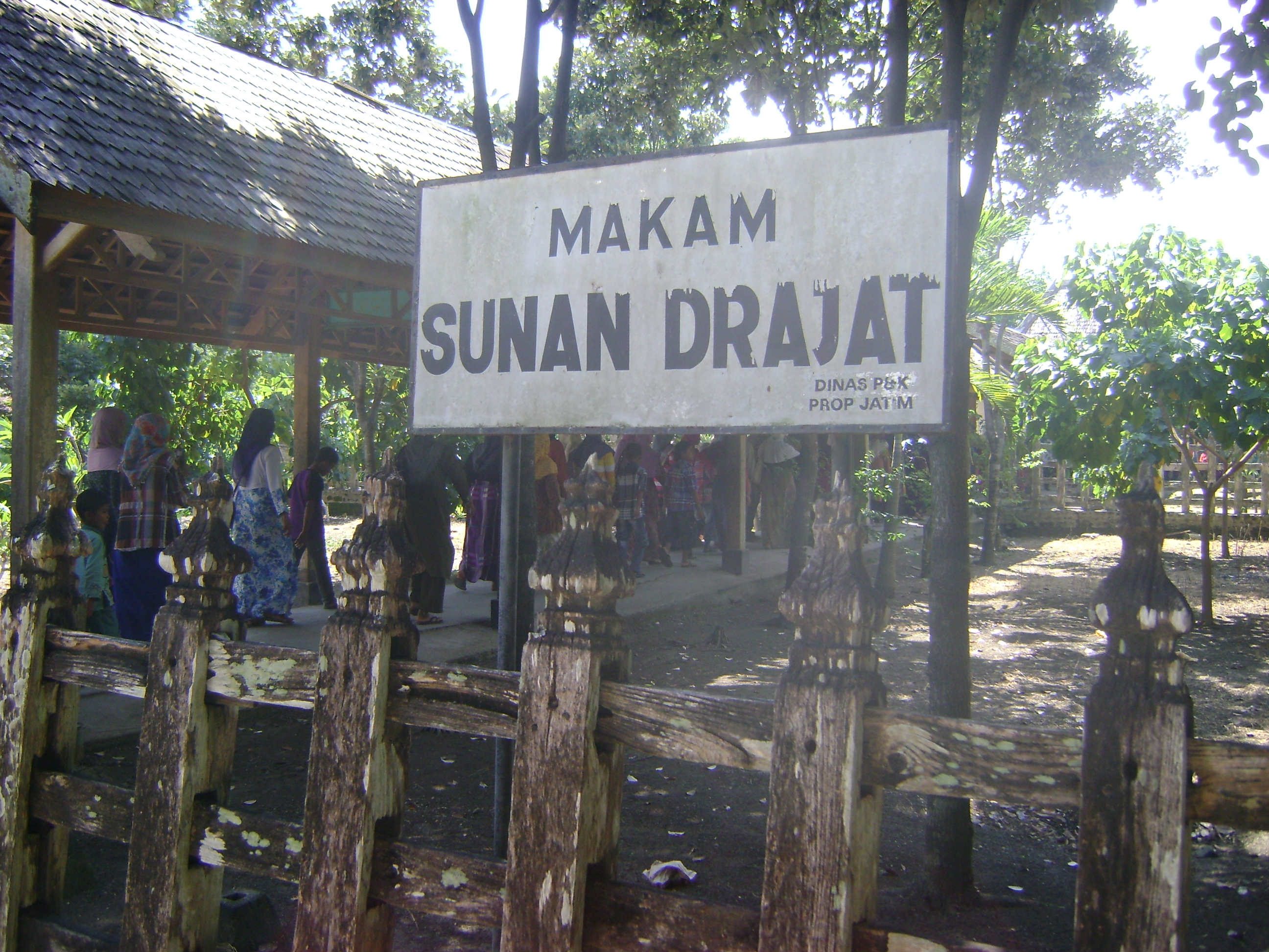 Makam Sunan Drajat Lamongan